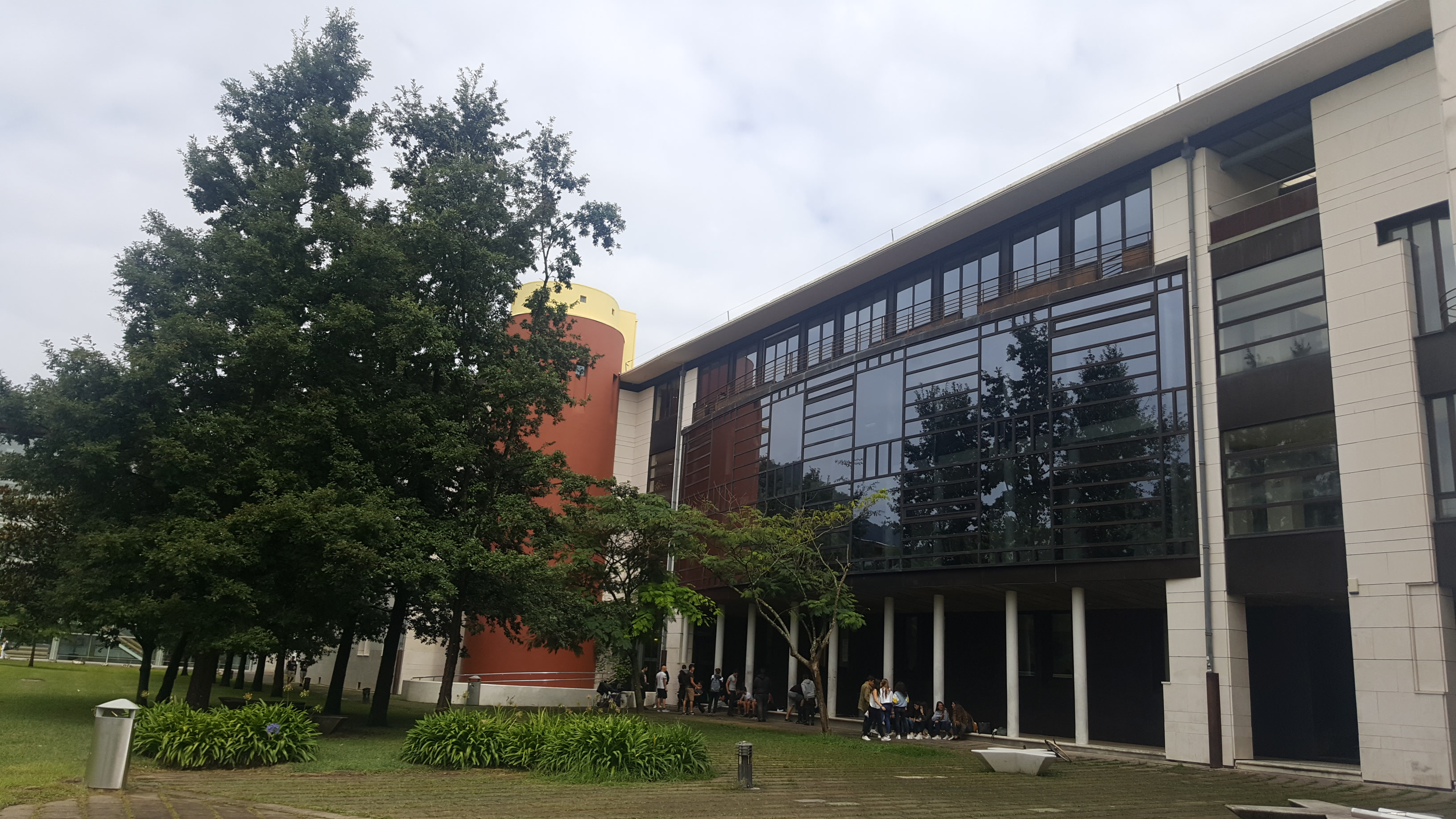 EHUko HEFA fakultateko edifizio bat